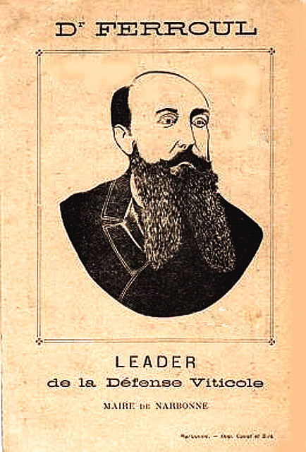 Ermest Ferroul maire de Narbonne